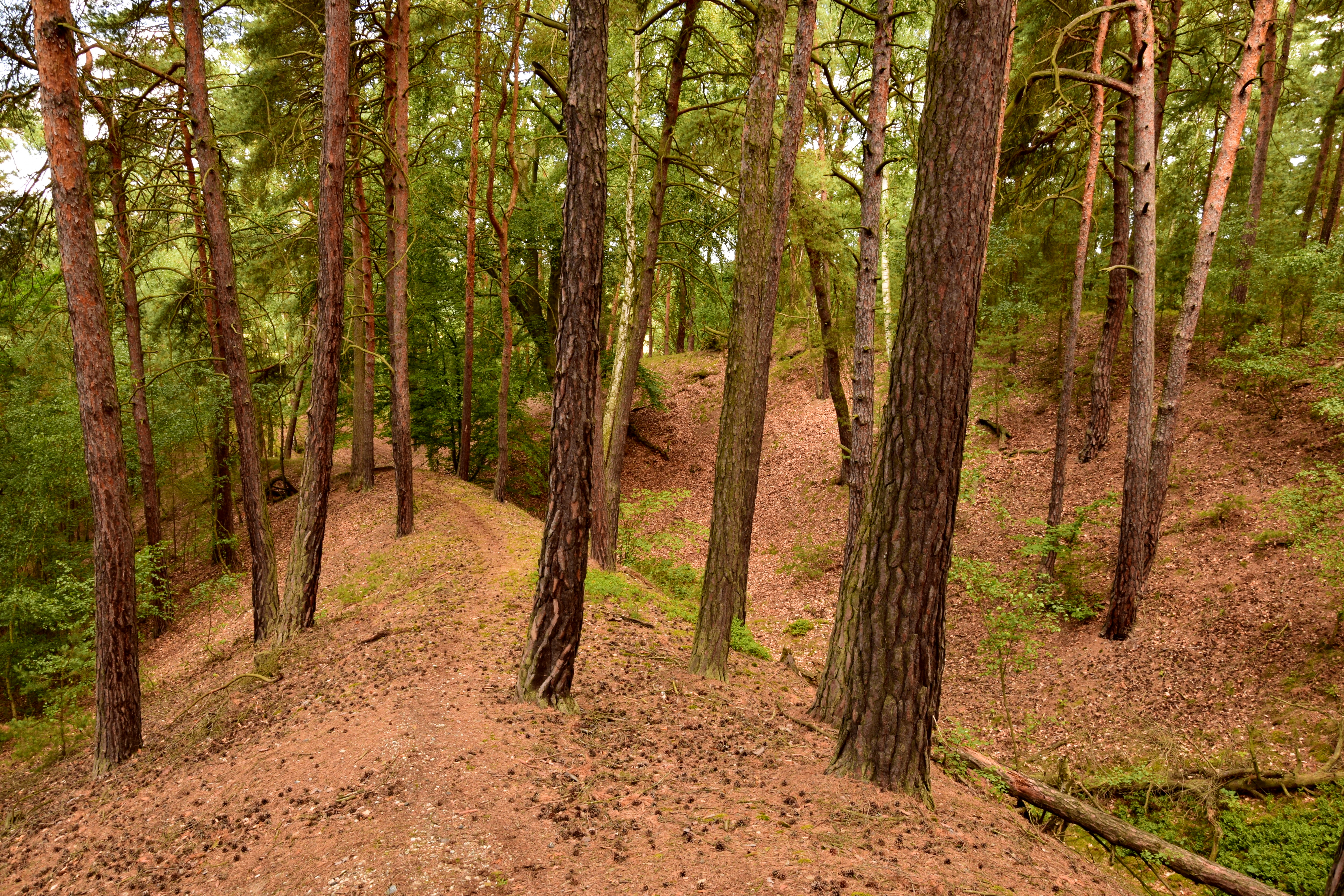 Hrad Hlavačov – val okolo hradního jádra